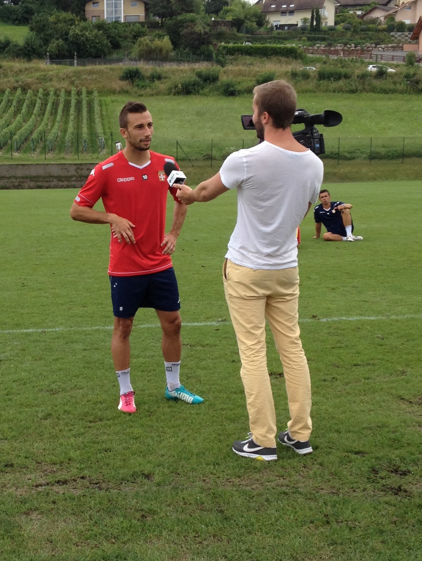 Nicolas Benezet interviewé par Canal+ lors de son passage à Evian en 2014 (crop).